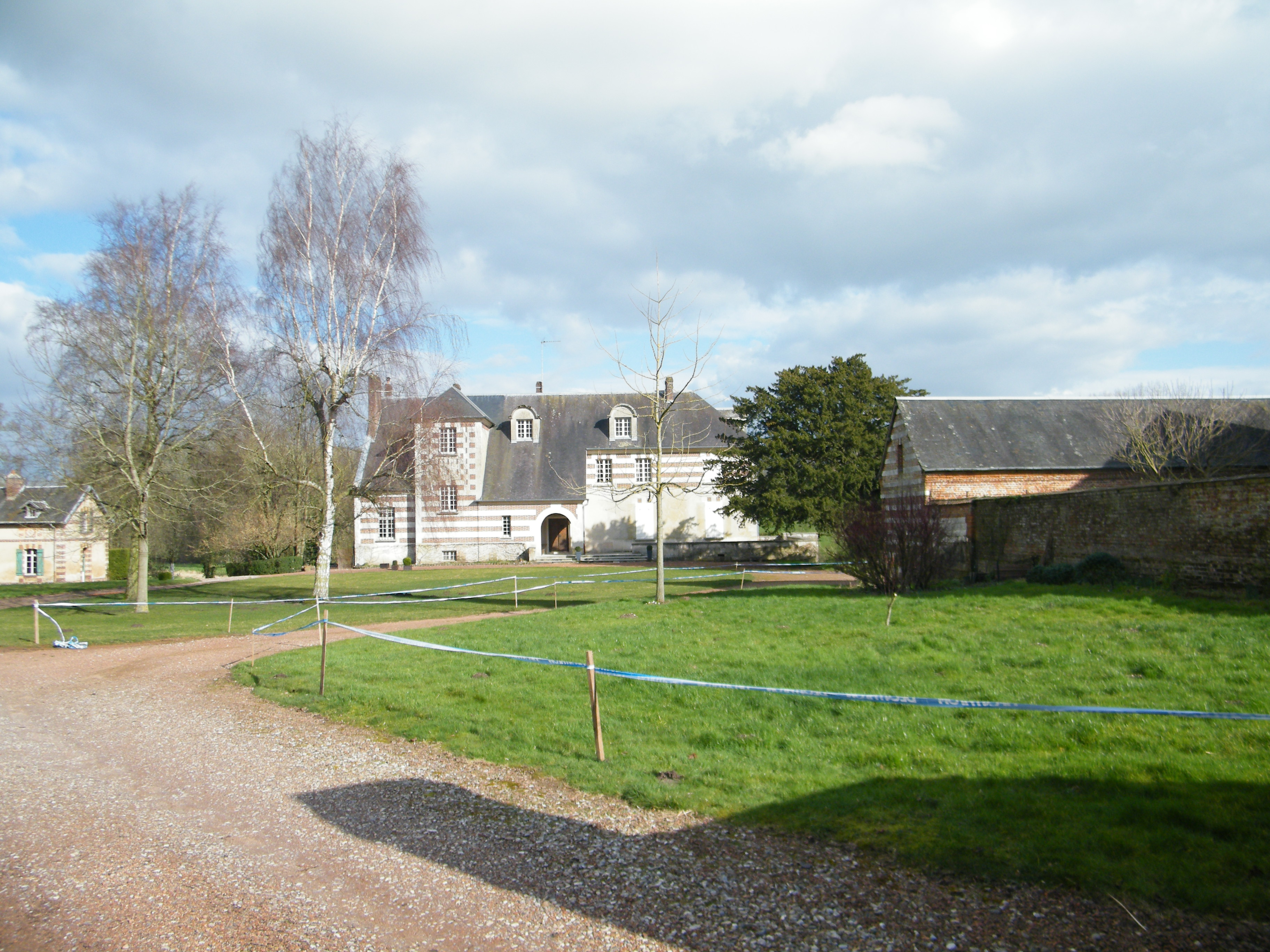 Château.